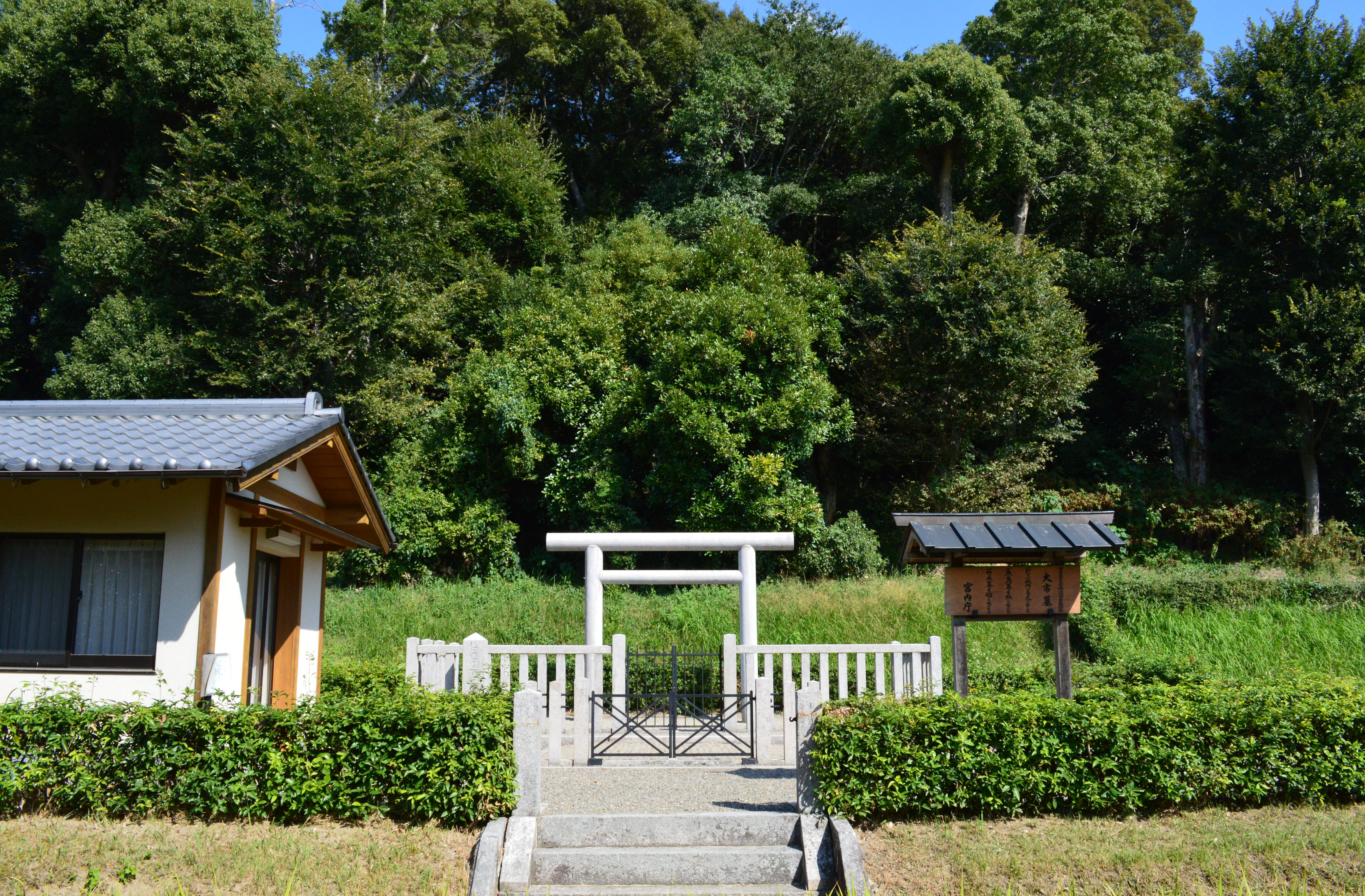 倭迹迹日百襲姫命大市墓 (箸墓古墳) 入り口